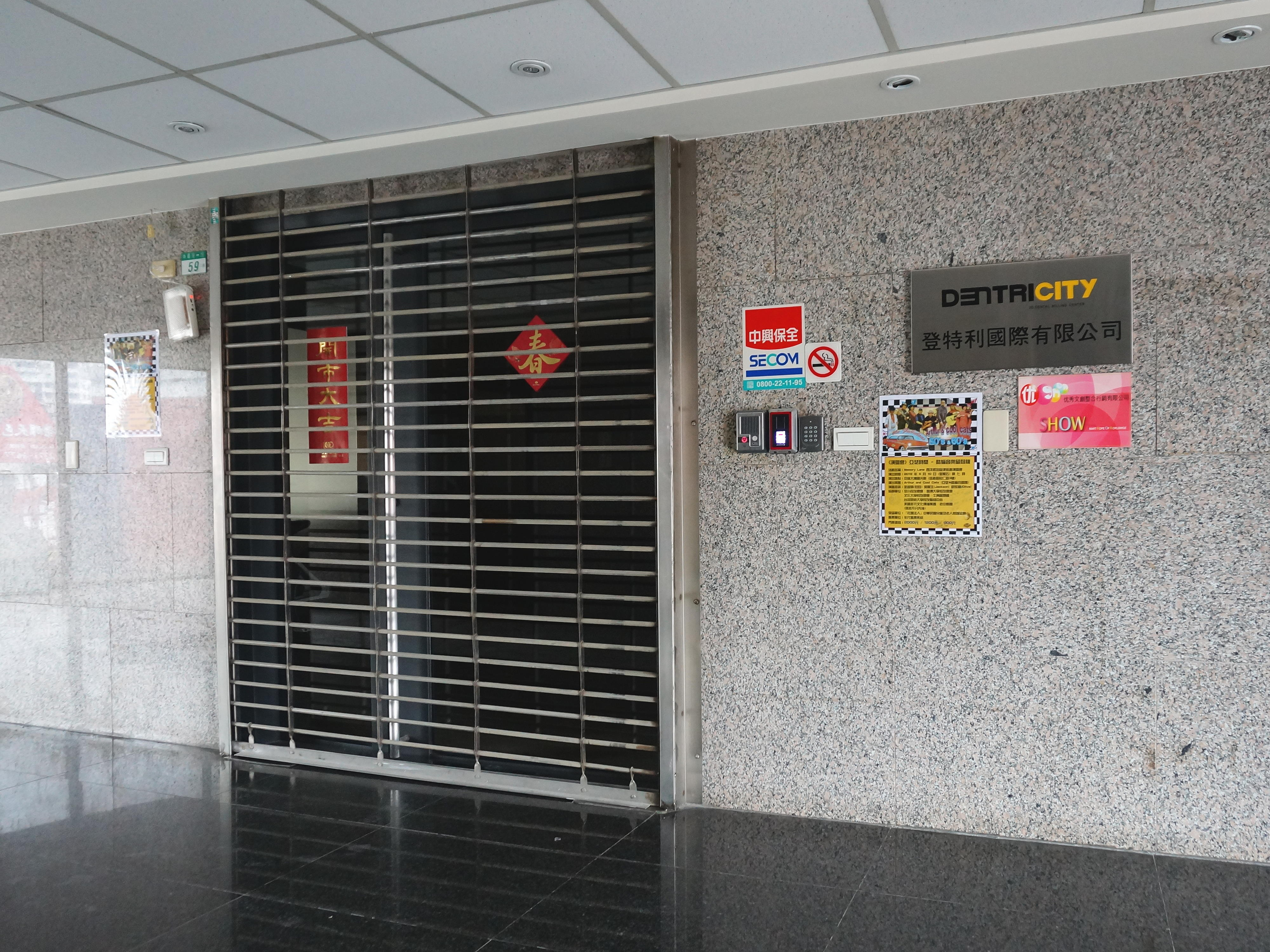 中文（台灣）: 擎天娛樂總部，位於臺北市中正區中華路一段59號6樓（英雄廣場商業大樓），大門無擎天娛樂商標。